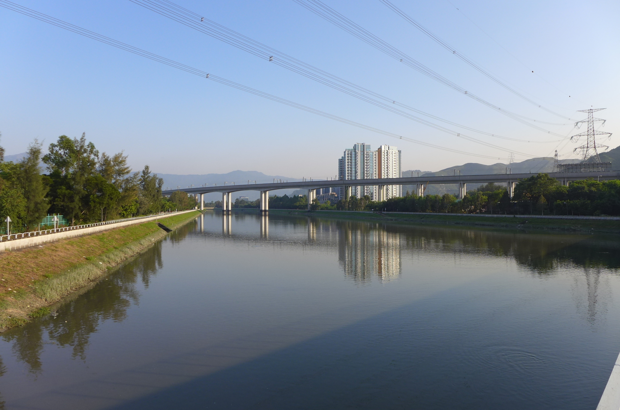 Kam Tin River